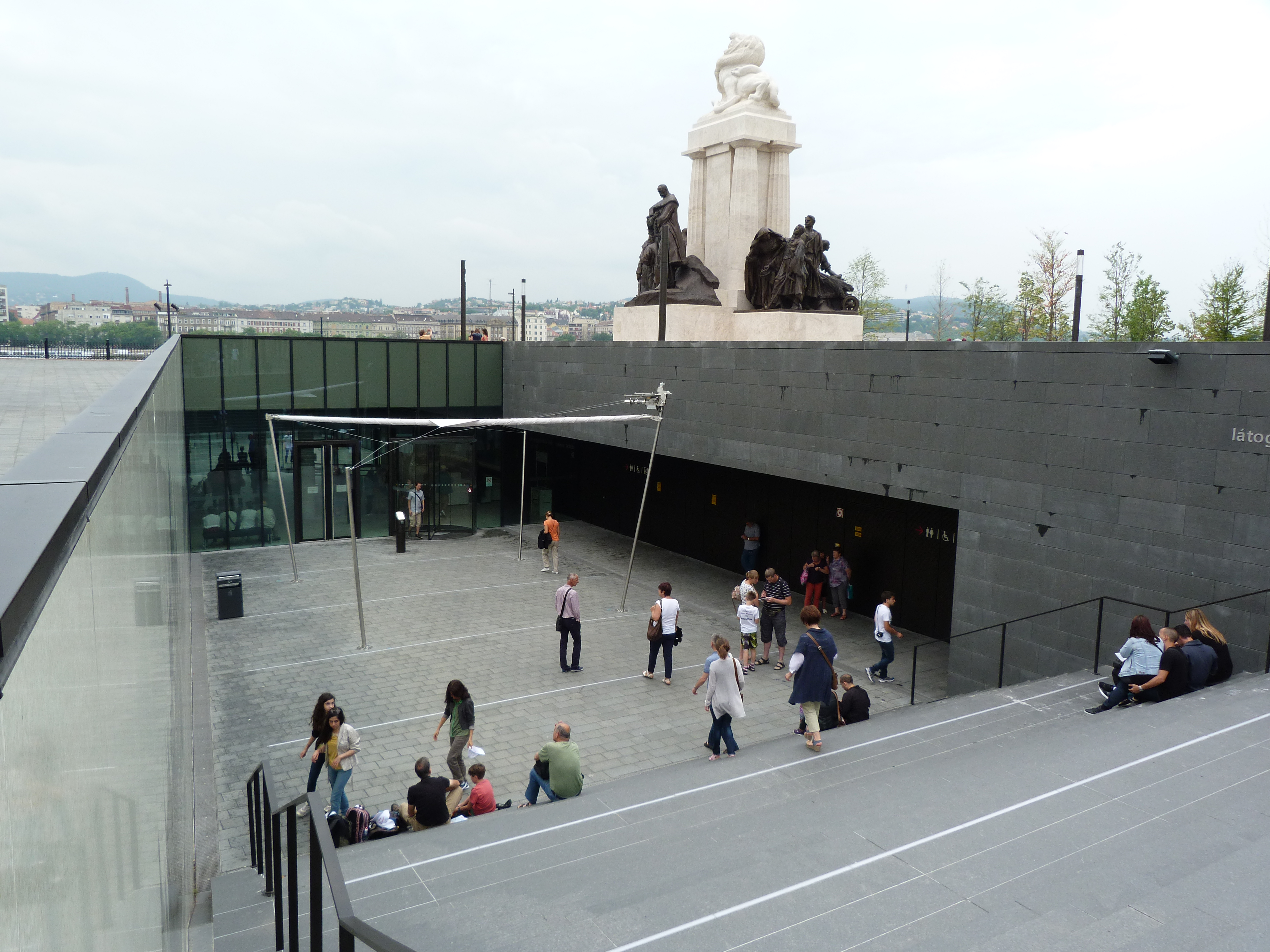 A felvétel 2014. július 11-én, pénteken készült Budapesten, az Országháznál. Látogatóközpont. A Látogatóközpont 2014. július 1-én nyitotta meg kapuit a nagyközönség előtt. ©© Derzsi Elekes Andor, Budapest, 2014, A kép és filmfelvételek egészben, vagy részletekben másolását, bármilyen úton történő sokszorosítását és felhasználását a szerző ellenérték nélkül, jogutódjaira is kihatóan megengedi. Az engedély kiterjed a kereskedelmi célú hasznosításra is. Kéri azonban nevének feltüntetését a felhasználás során. A Metapolisz sorozat valamennyi képe és filmje Creative Commons alatti valamint kereskedelmi - for profit - célra is felhasználható. Ajánlott hivatkozás: Derzsi Elekes Andor: Metapolisz DVD line